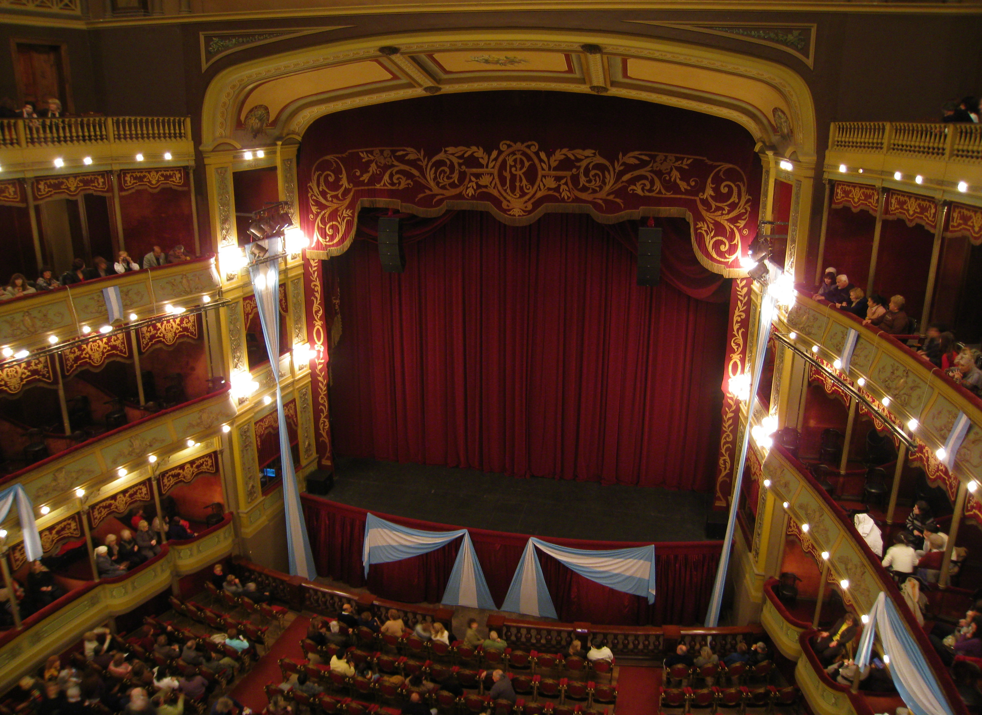 Concert hall, Teatro Libertador, Córdoba, Argentina.